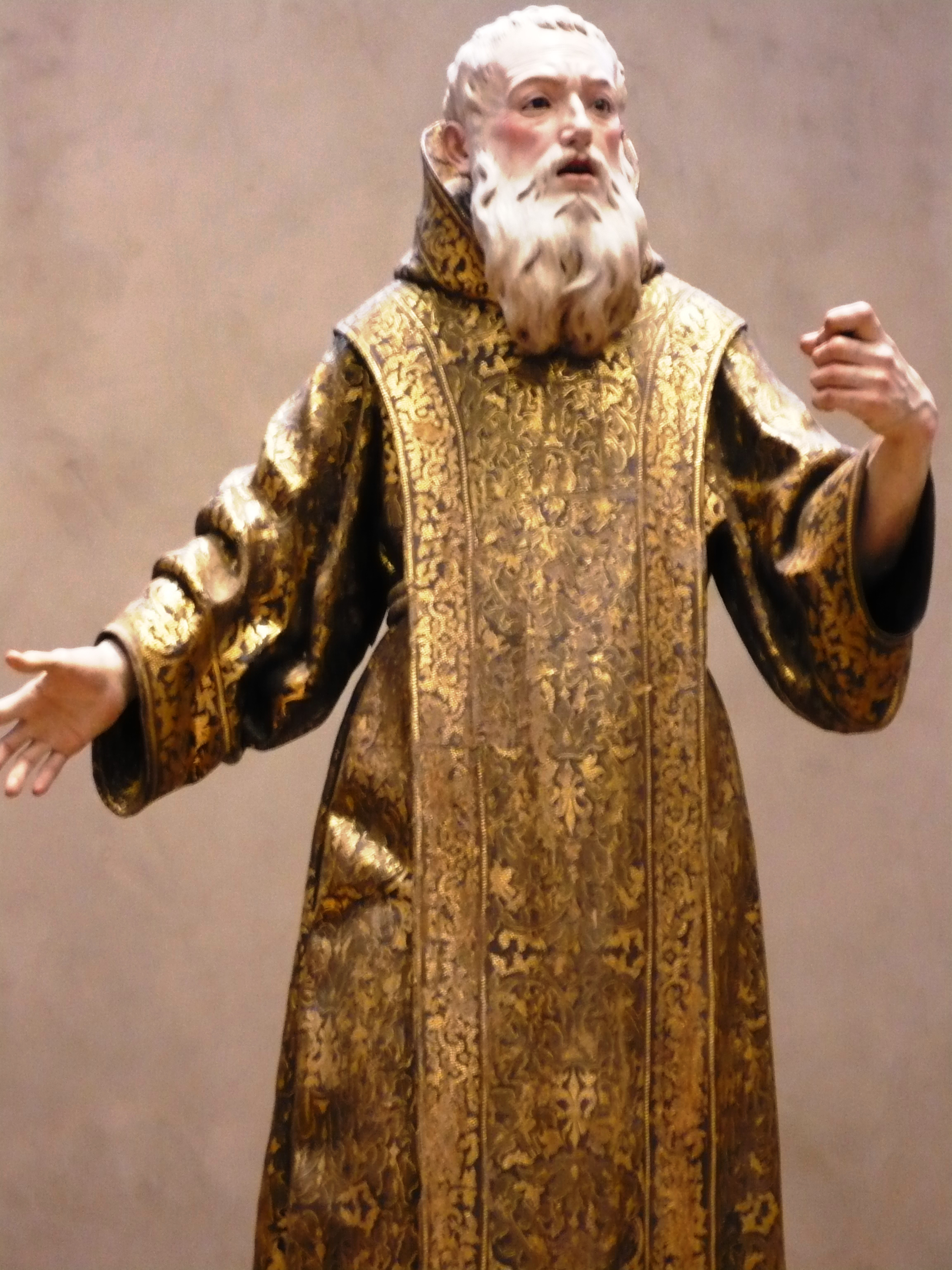 Saint Ginés de la Jara (also known as Ginés de la Xara, Ginés el Franco, Genesius Sciarensis), semi-legendary saint of Spain. Statue by "La Roldana," Luisa Ignacia Roldán.